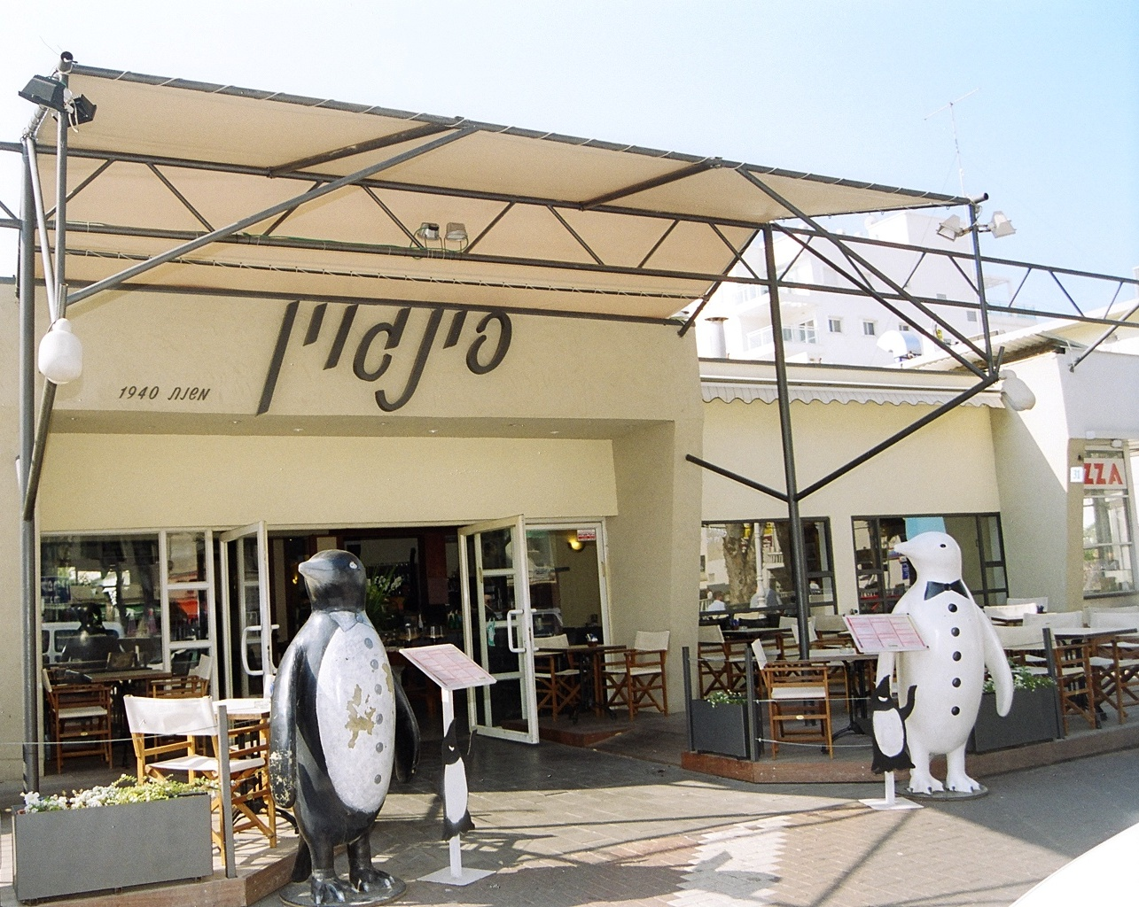 פינגוין 2015